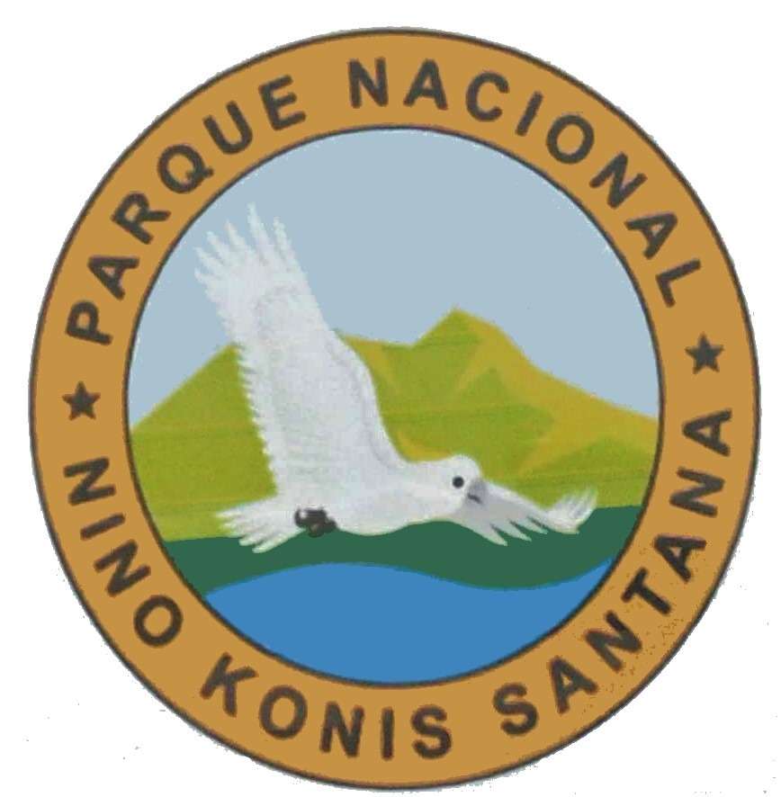 Logo des Nationalparks Nino Konis Santana